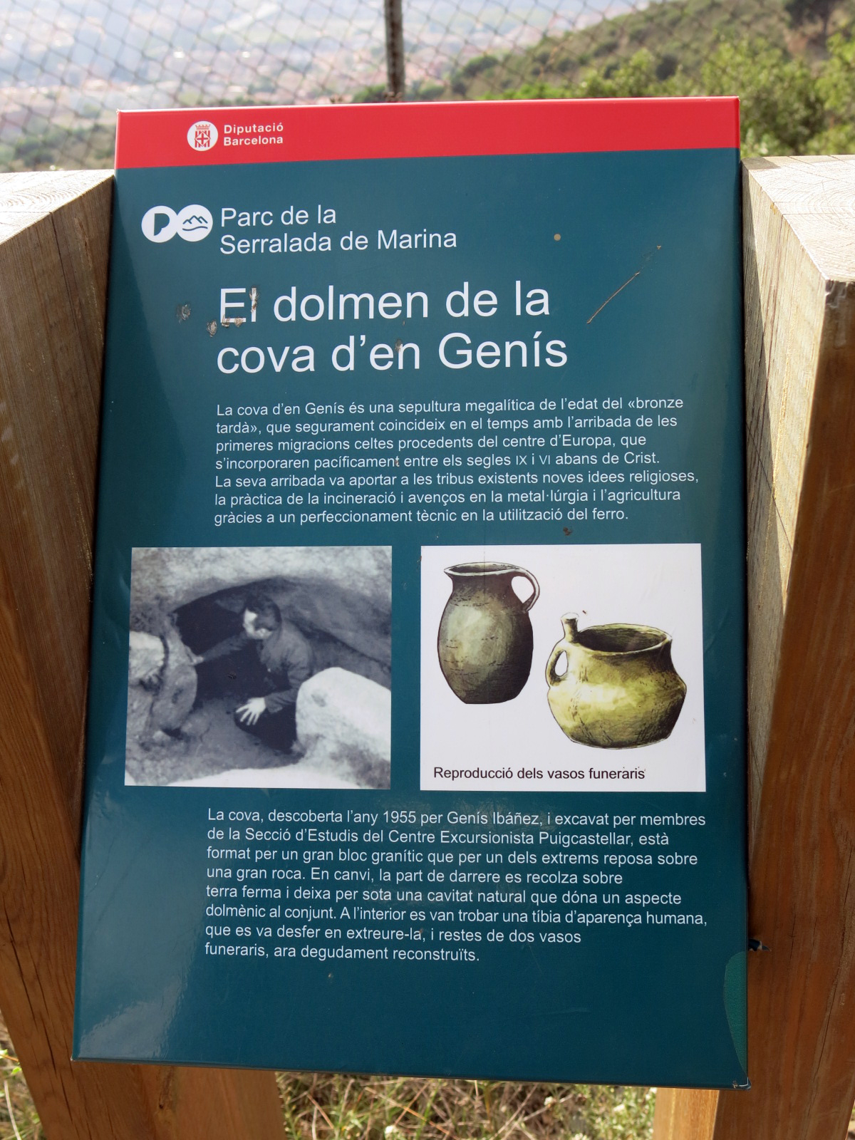 Cau d'en Genís (Badalona), plafó